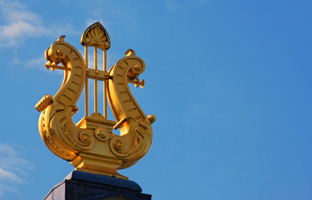 22 lier concertgebouw